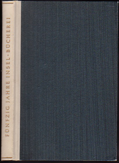 Katalog 50 Jahre Insel-Bücherei)